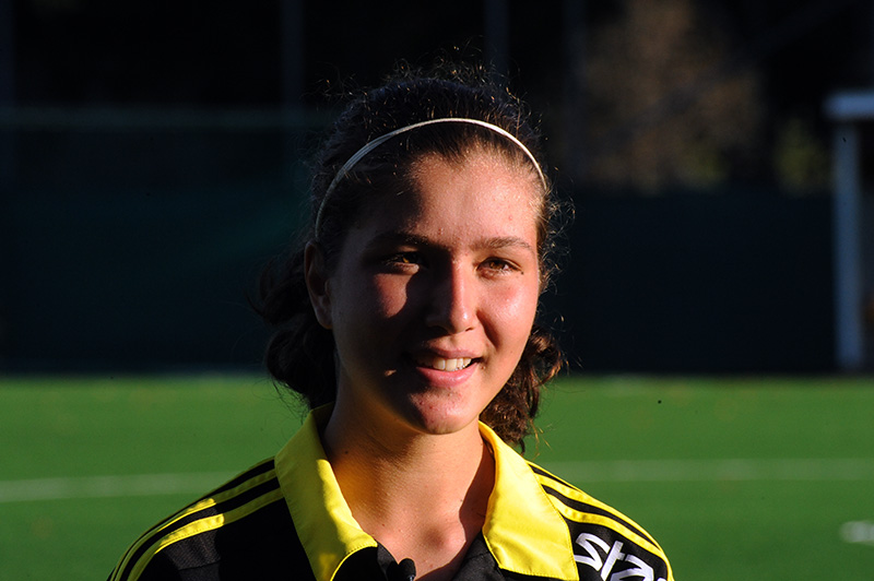 Loreta Kullashi in 2015